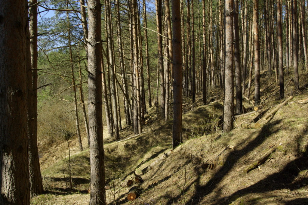 Mummassaares taastatud Rebase pataljoni kaevikud Sinimägede lahingu ajast.